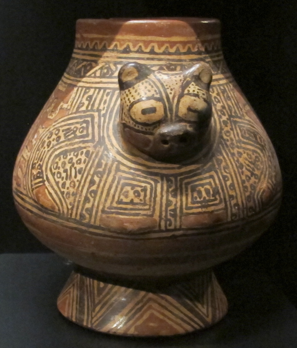 Musée du quai Branly